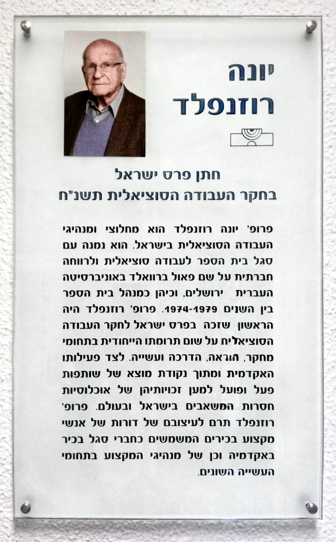 שלט יונה רוזנפלד בפתח בית הספר לעבודה סוציאלית בקמפוס האוניברסיטה העברית בהר הצופים